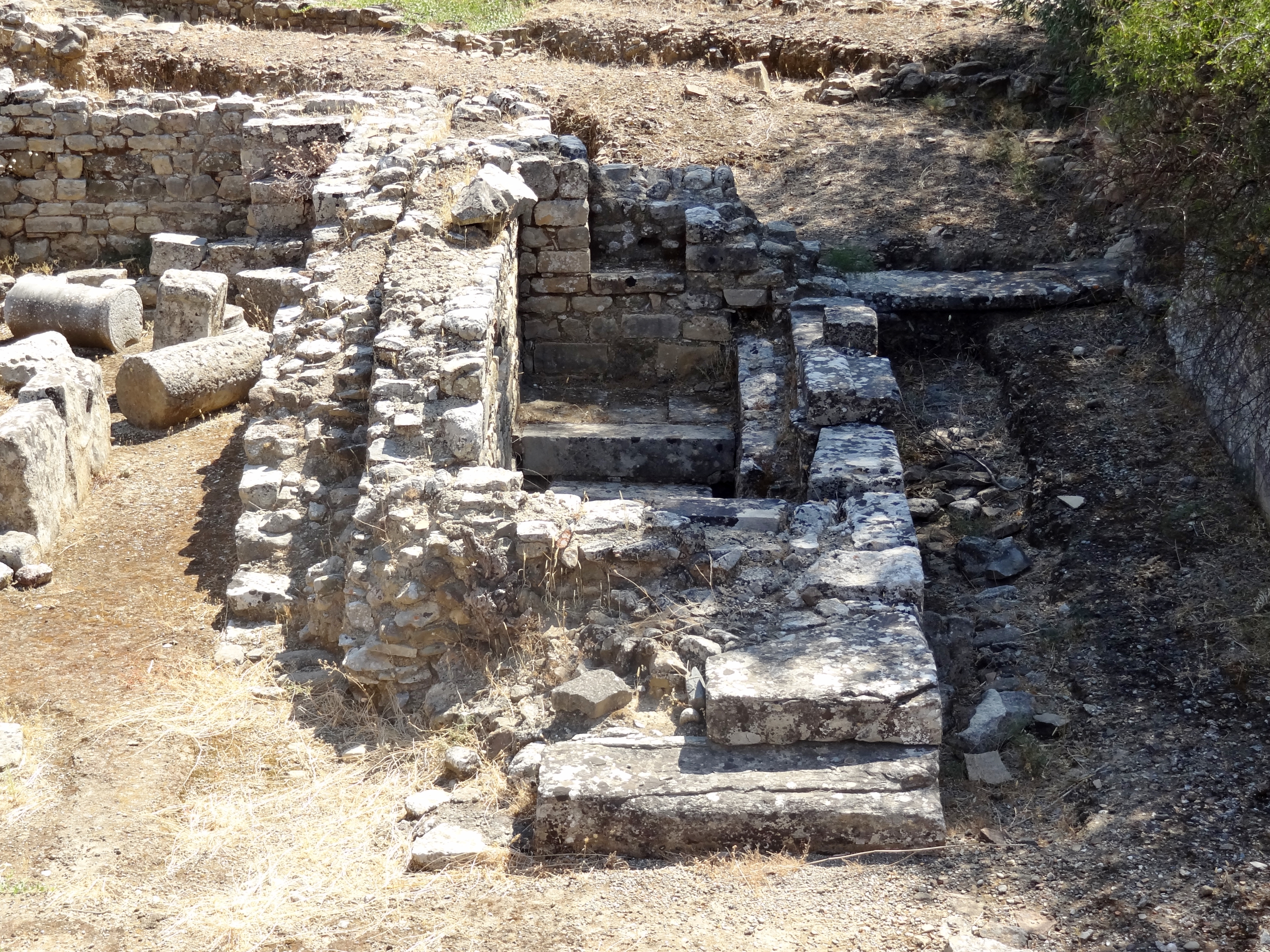 Reste der griechisch-römischen Stadt Gortyn (Γορτύν), Gemeinde Gortyna, Regionalbezirk Iraklio, Kreta, Griechenland